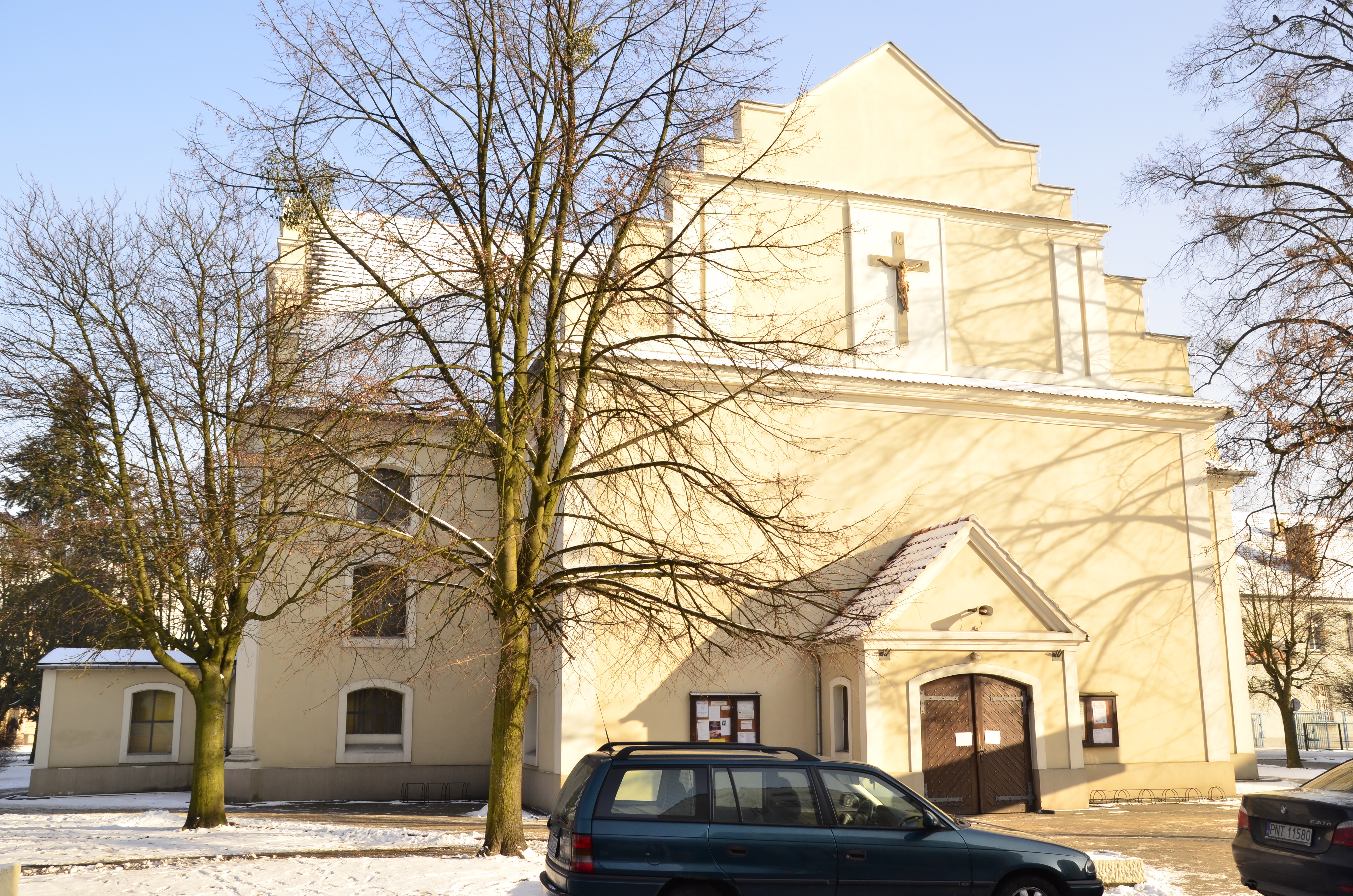 kościół par. pw. MB Nieustającej Pomocy z 1896 r. Nowy Tomyśl, ul. Piłsudskiego 33, Nowy Tomyśl